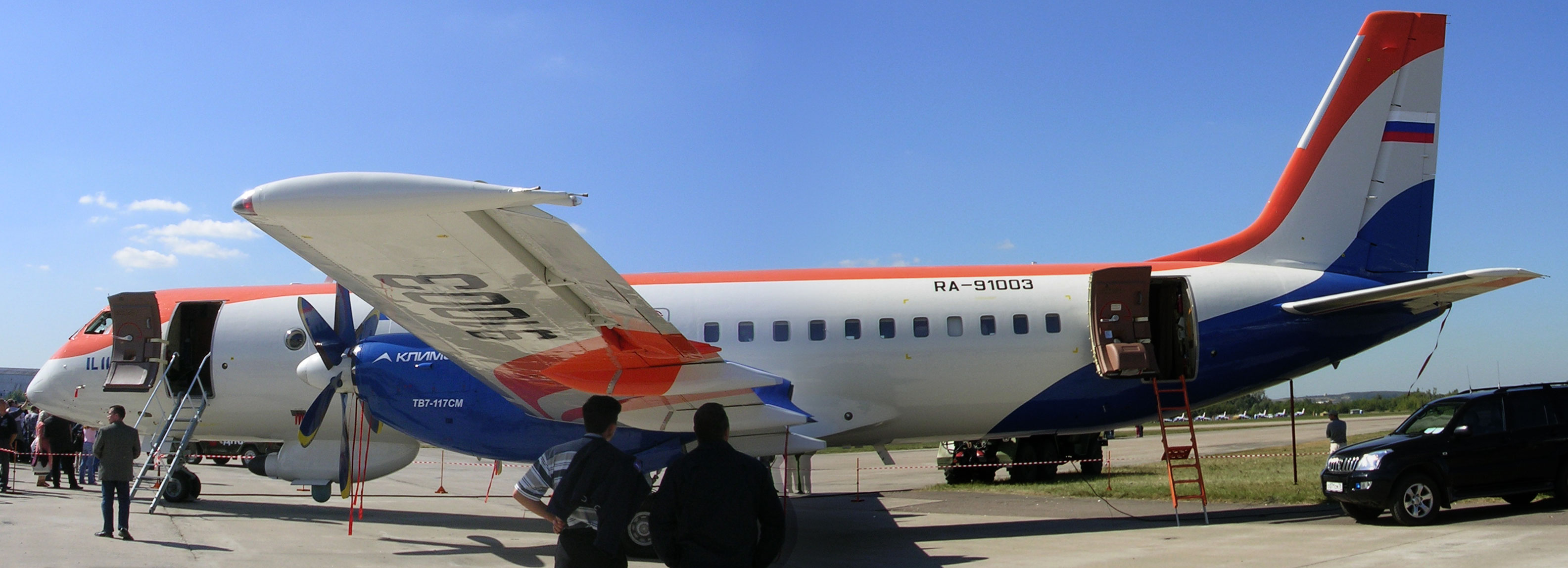 Самолёт-лаборатория на базе Ил-114 на выставке МАКС-2005